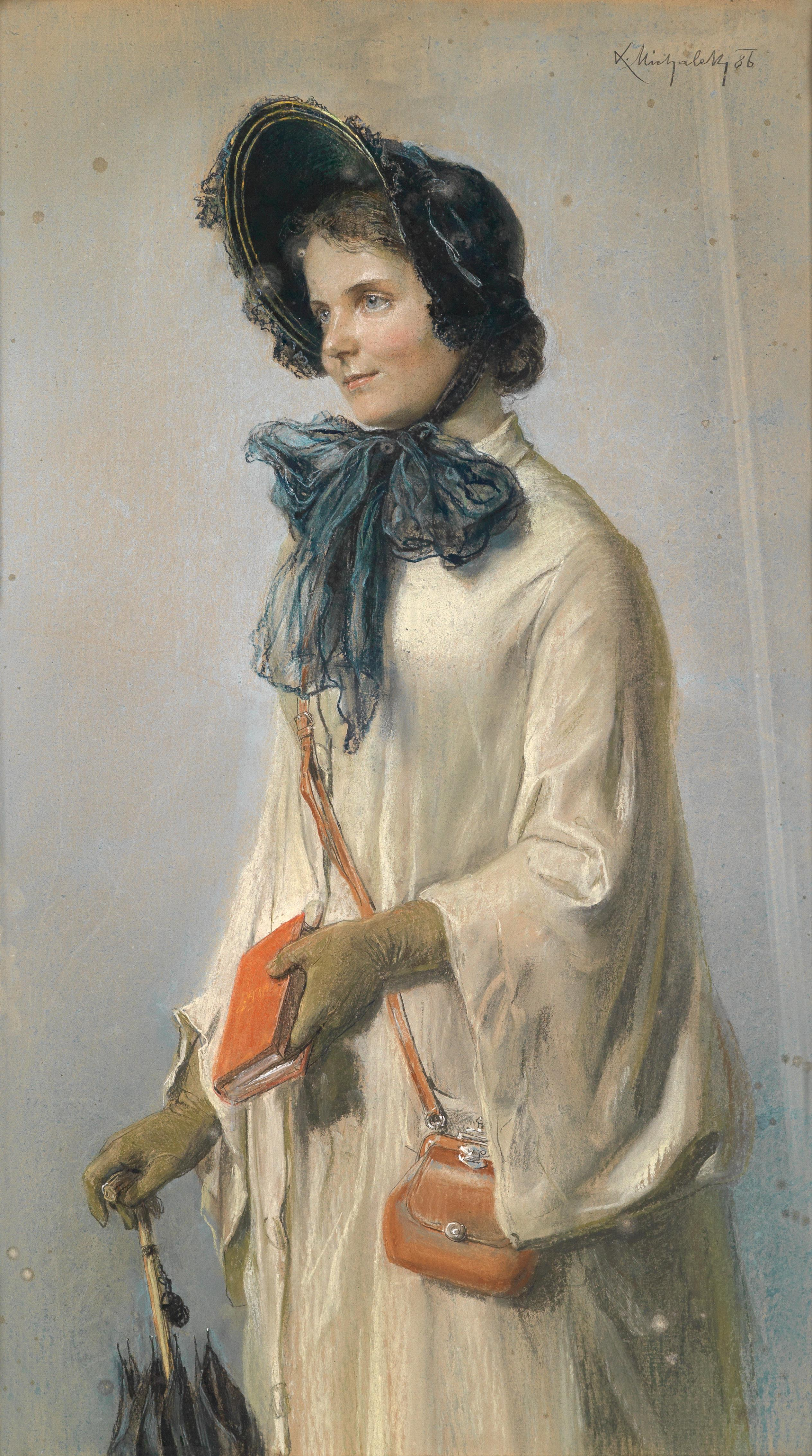 Auf der Reise